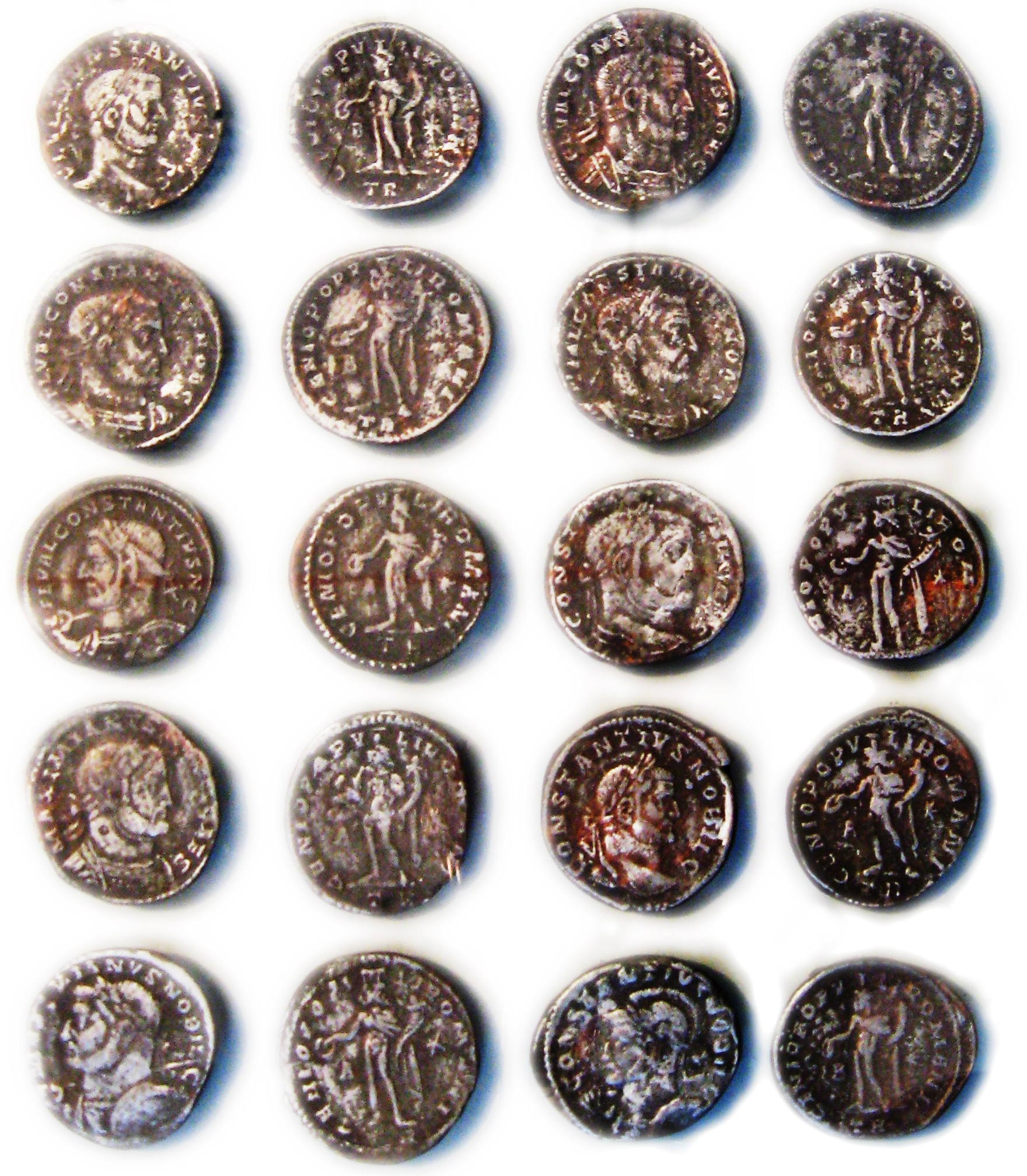 Münzfunde im Pachtener Museum.